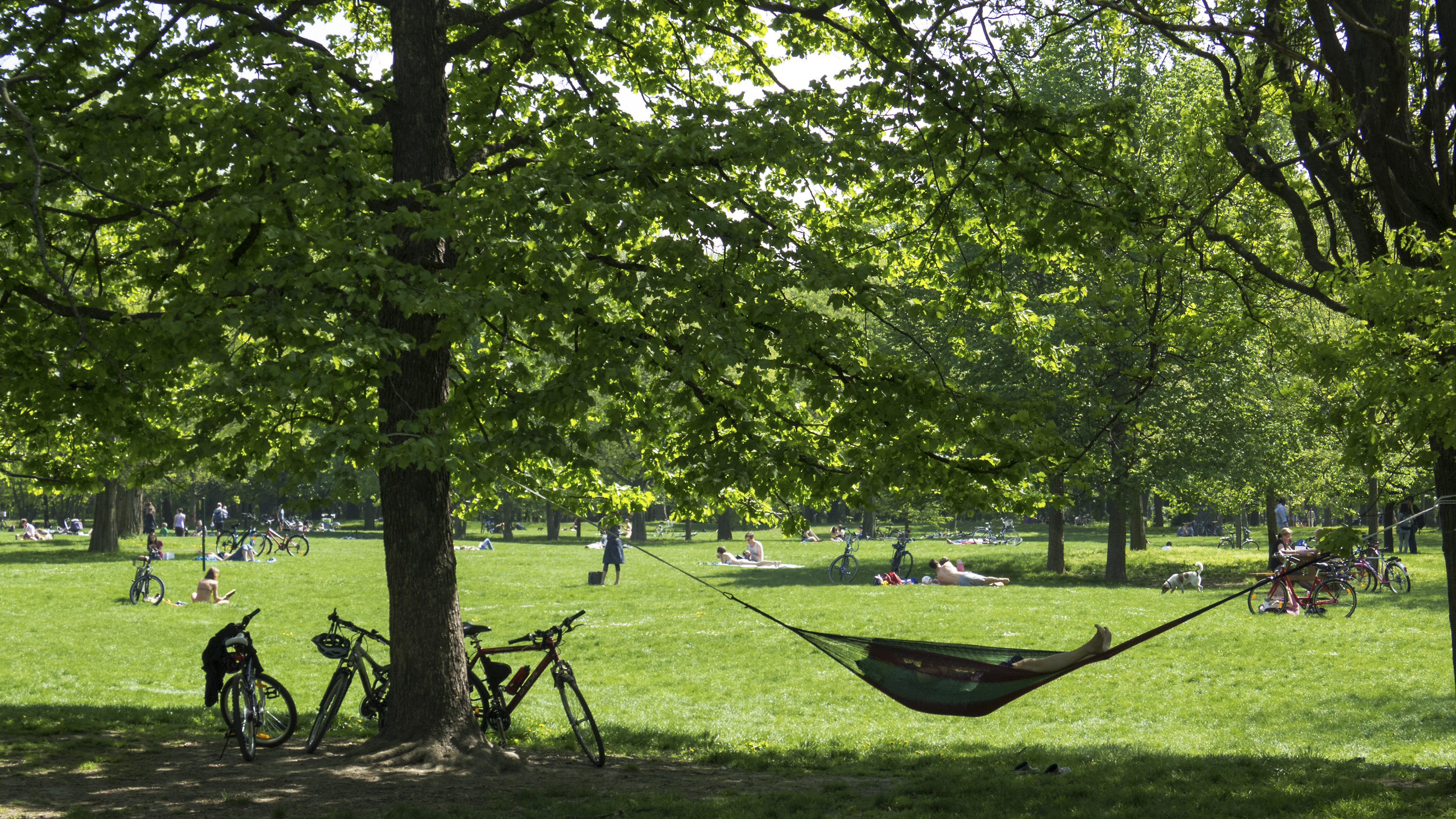 Arenawiese im Wiener Prater in Wien 2